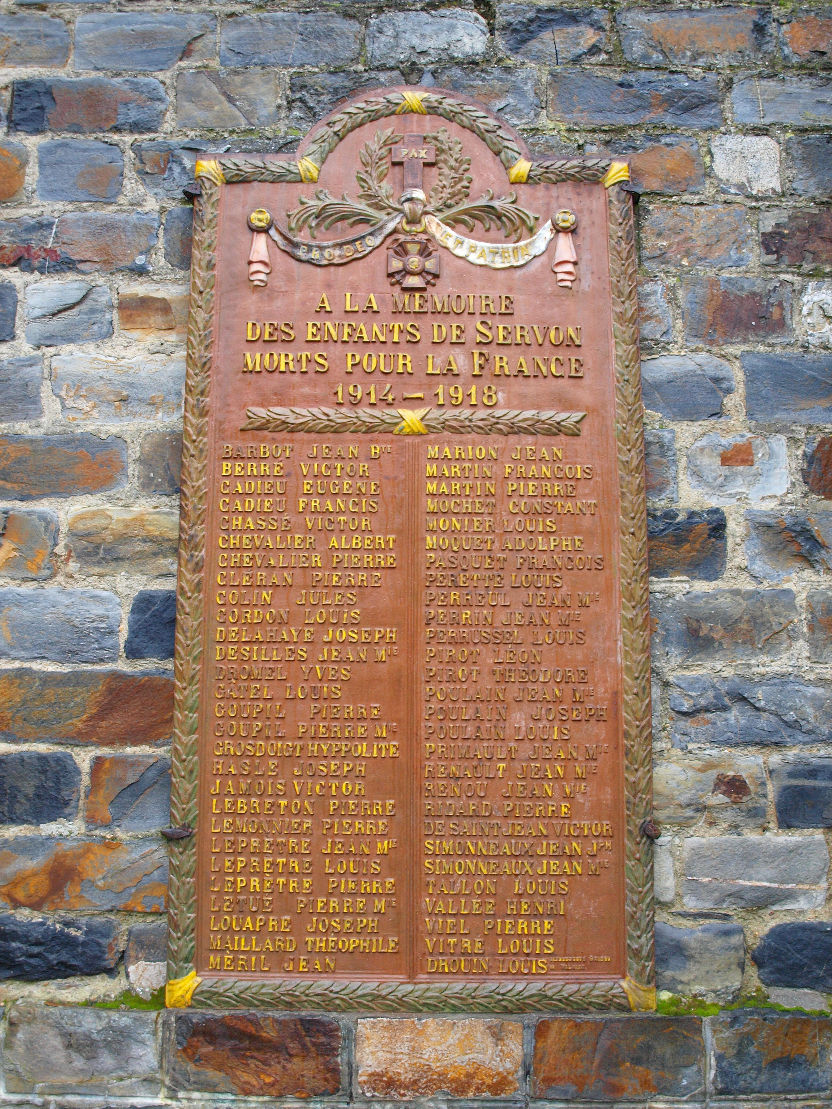 Servon-sur-Vilaine (Ille-et-Vilaine, France), monument aux morts